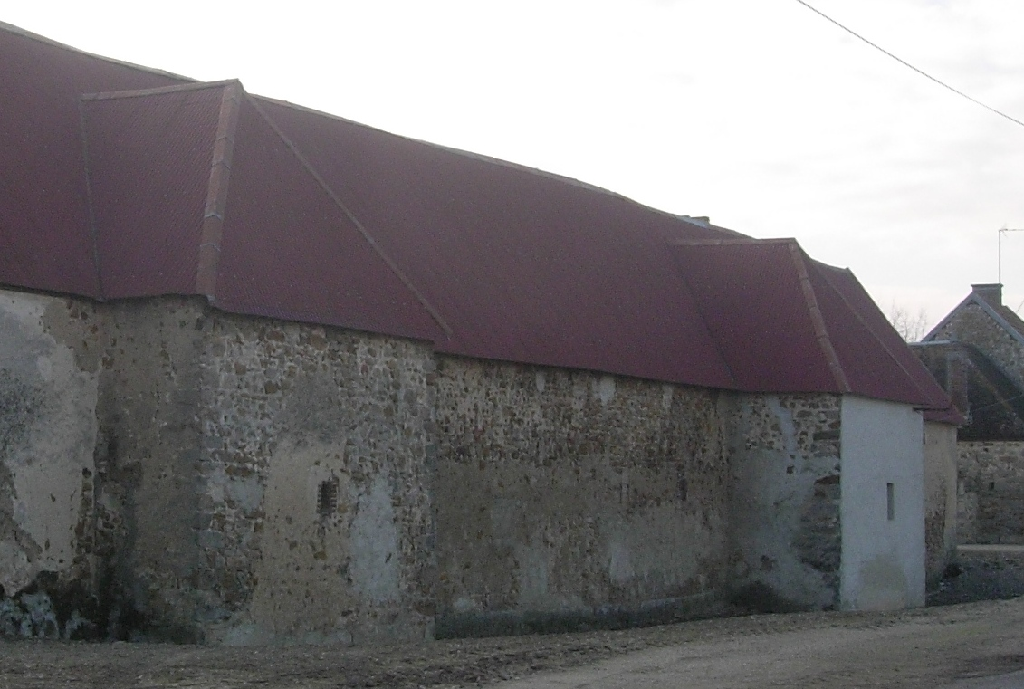 Avon-le-Pèze